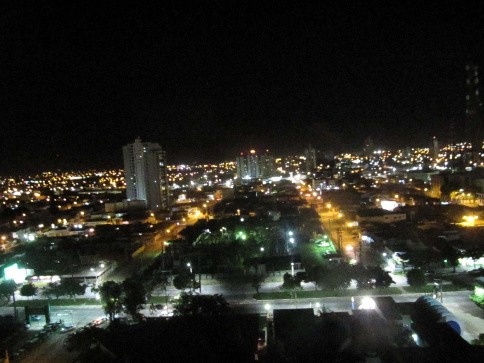 Vista de Feira de Santana por um edifício, no bairro Kalilândia. Embaixo está a Avenida Maria Quitéria.